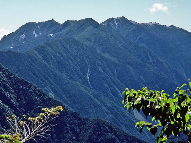 Sierra Houou, en Sierra Akaishi, de japon. Pico agudo en izquierda pico Zizou-dake(2764m), Kan-non-dake(2840m) en centro-derecho y Yakushi-dake(2780m) en derecho. Foto desde Senjyo-dake. 赤石山脈鳳凰三山。左の鋭鋒は地蔵岳(2764m)、中央やや右が観音岳(2840m)、右が地蔵岳(2780m)。仙丈岳中腹より撮影。